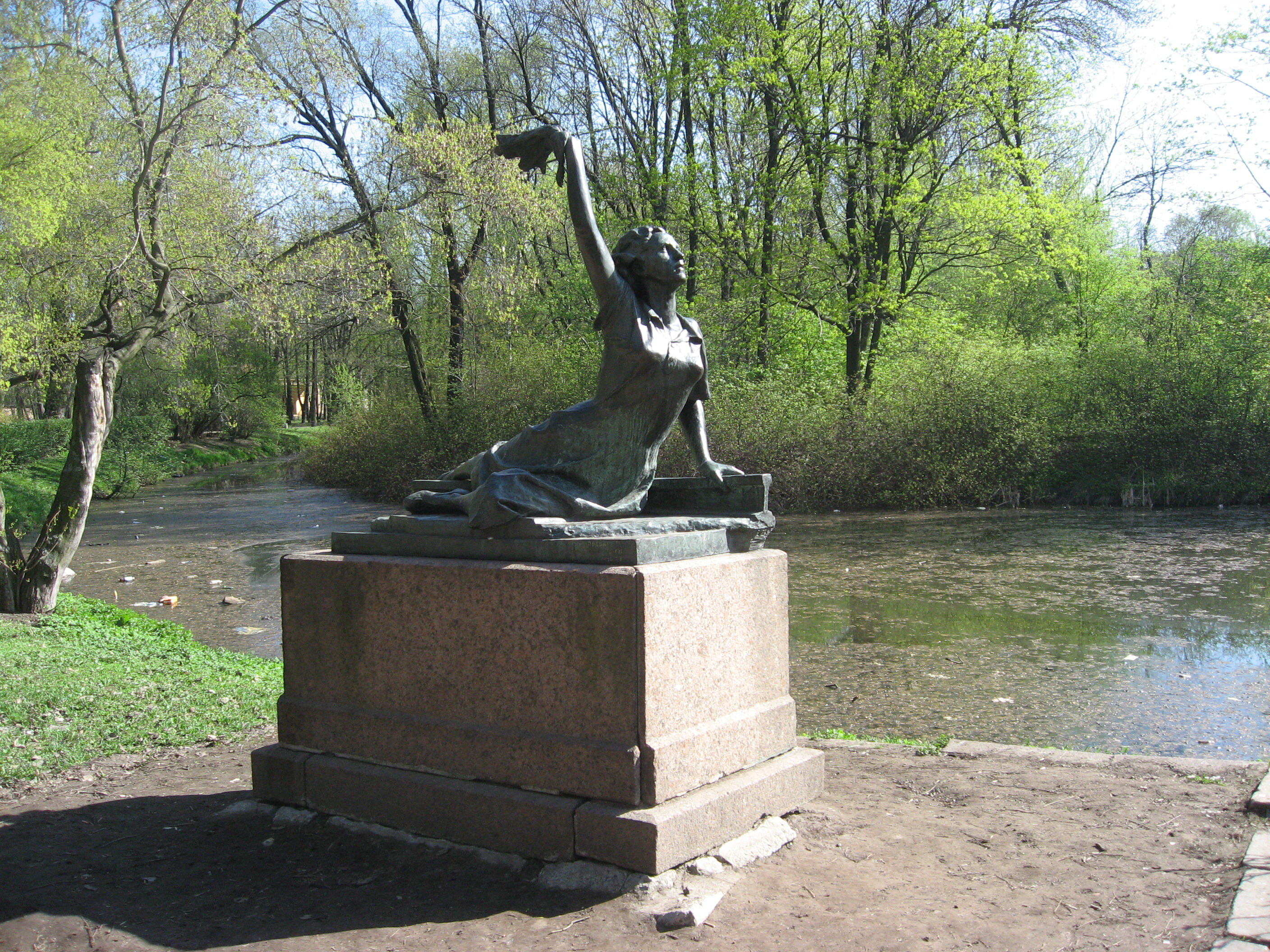 Скульптура в Московском парке Победы, рассказывающая о подвиге Раймонды Дьен. Скульптор Ц. И. Дивеева, архитектор В. Д. Кирхоглани. 1953 год